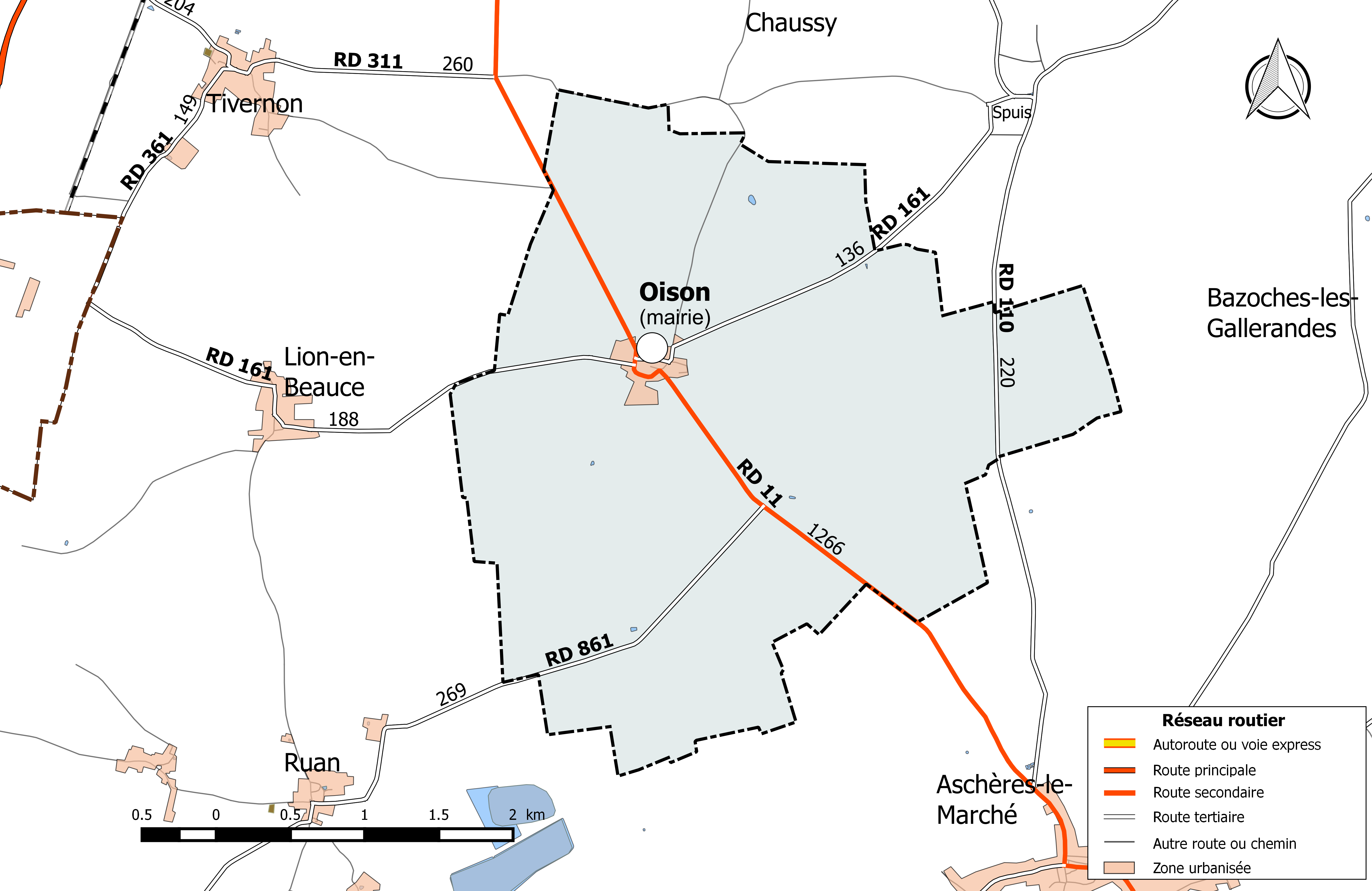 Carte du réseau routier de la commune de Oison (Loiret).